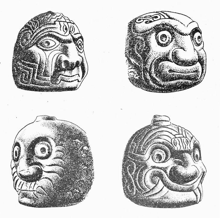 Algunas cabezas clavas de la cultura chavin